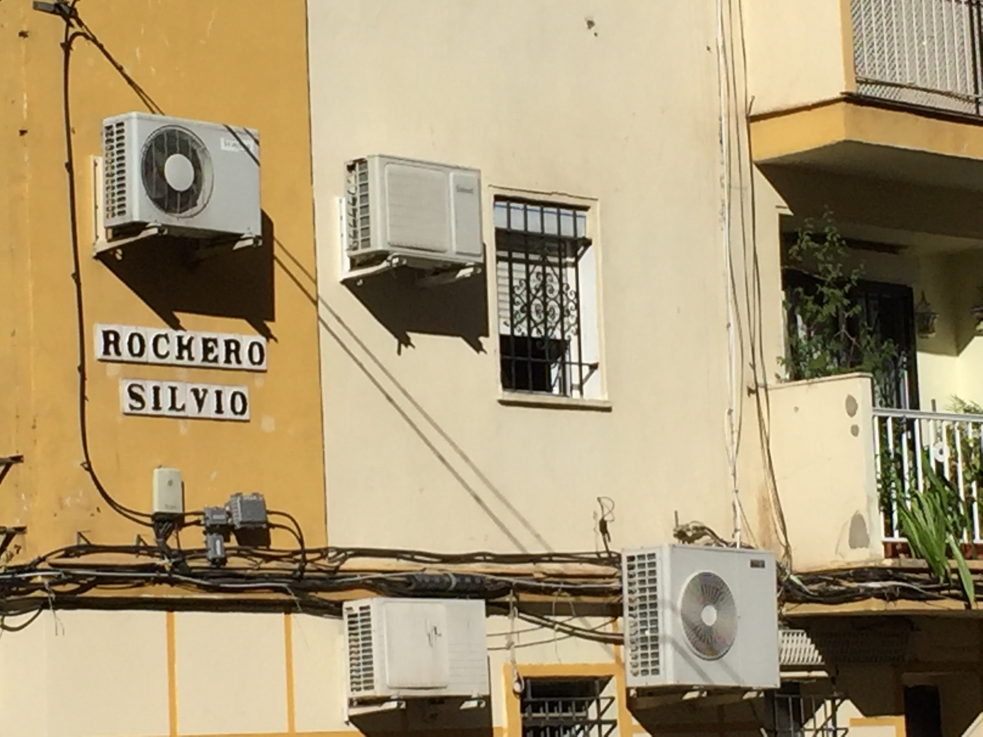 Calle Rockero Silvio en el barrio de Los Remedios de Sevilla. El nombre de la calle honra a Silvio Fernández Melgarejo.